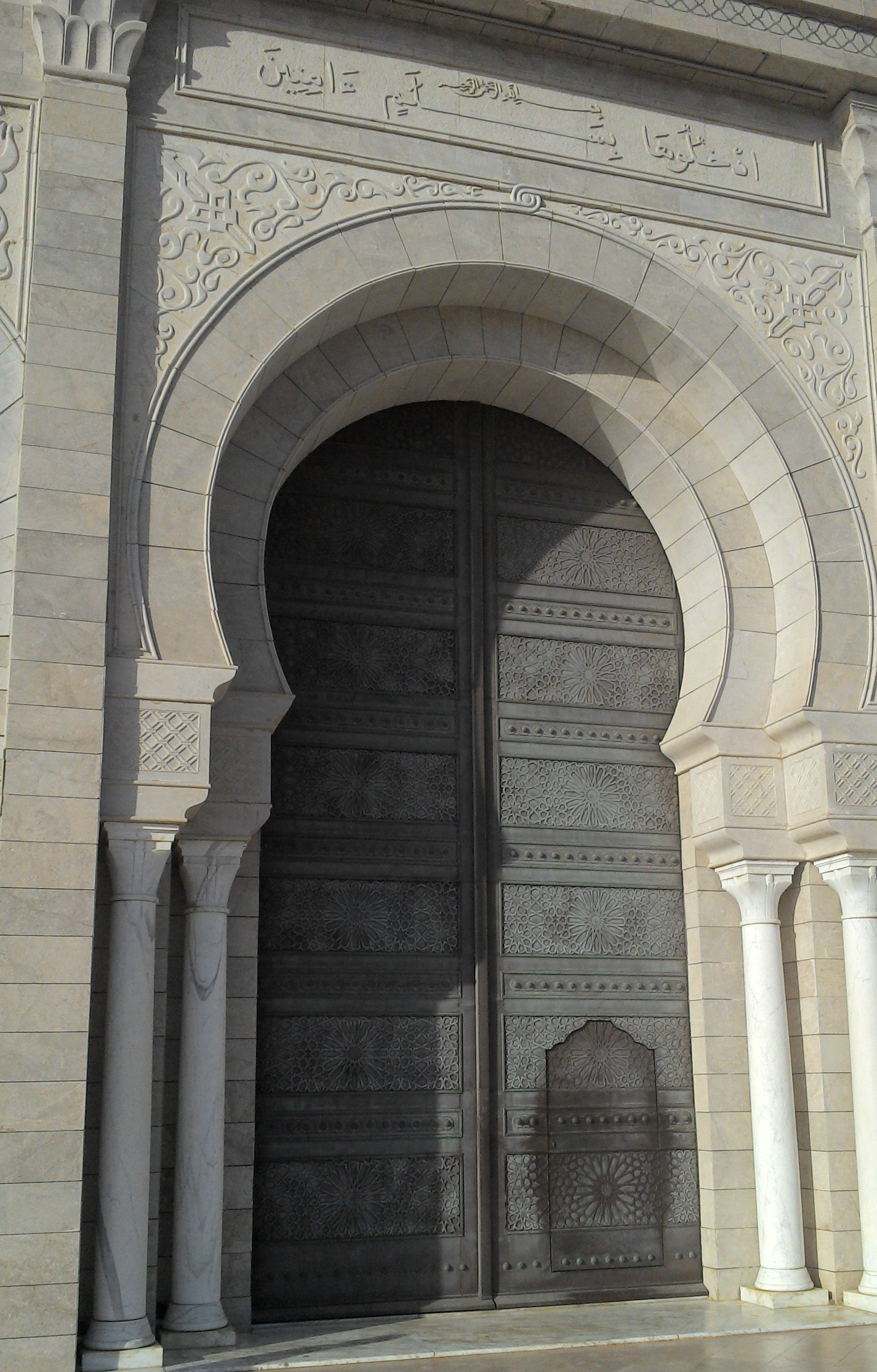 باب جامع جامع مالك بن أنس ب تونس العاصمة. يتوسط الباب خوخة.